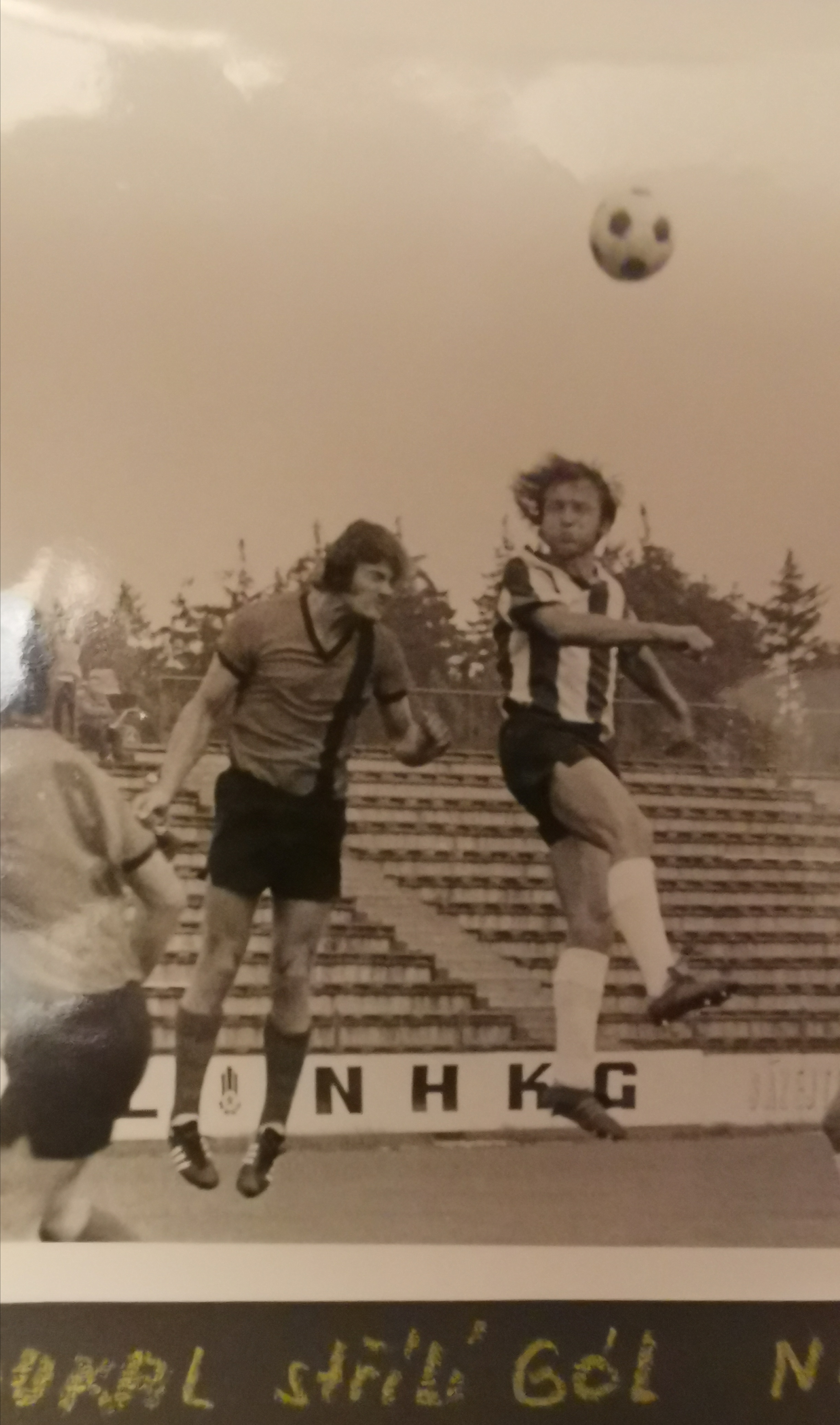 Miloš